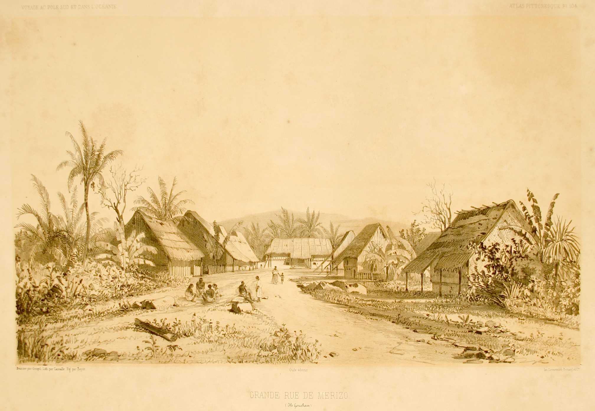 Grande rue de Merizo. Atlas pittoresque, planche 104